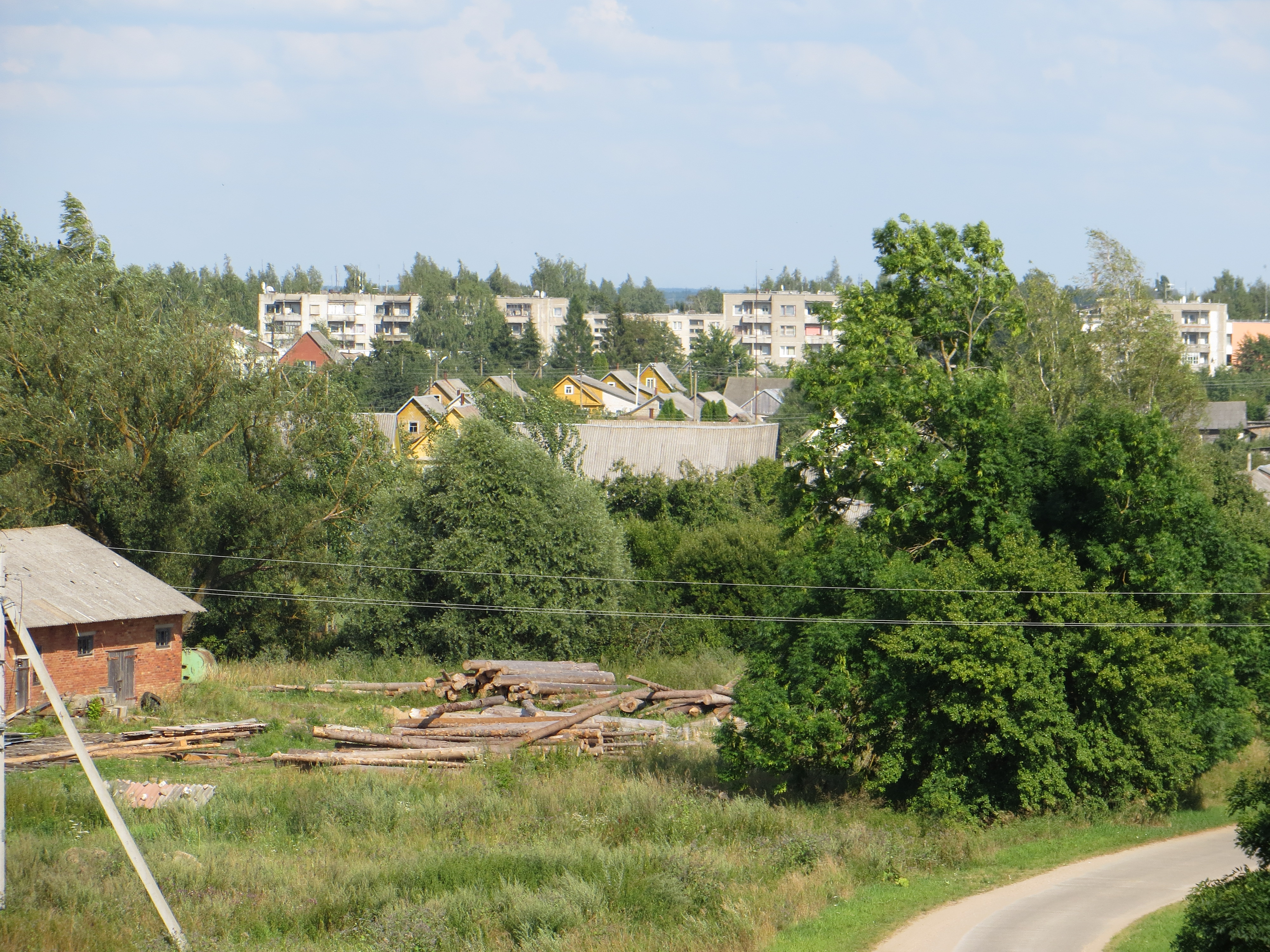 Didžiasalis, Lithuania